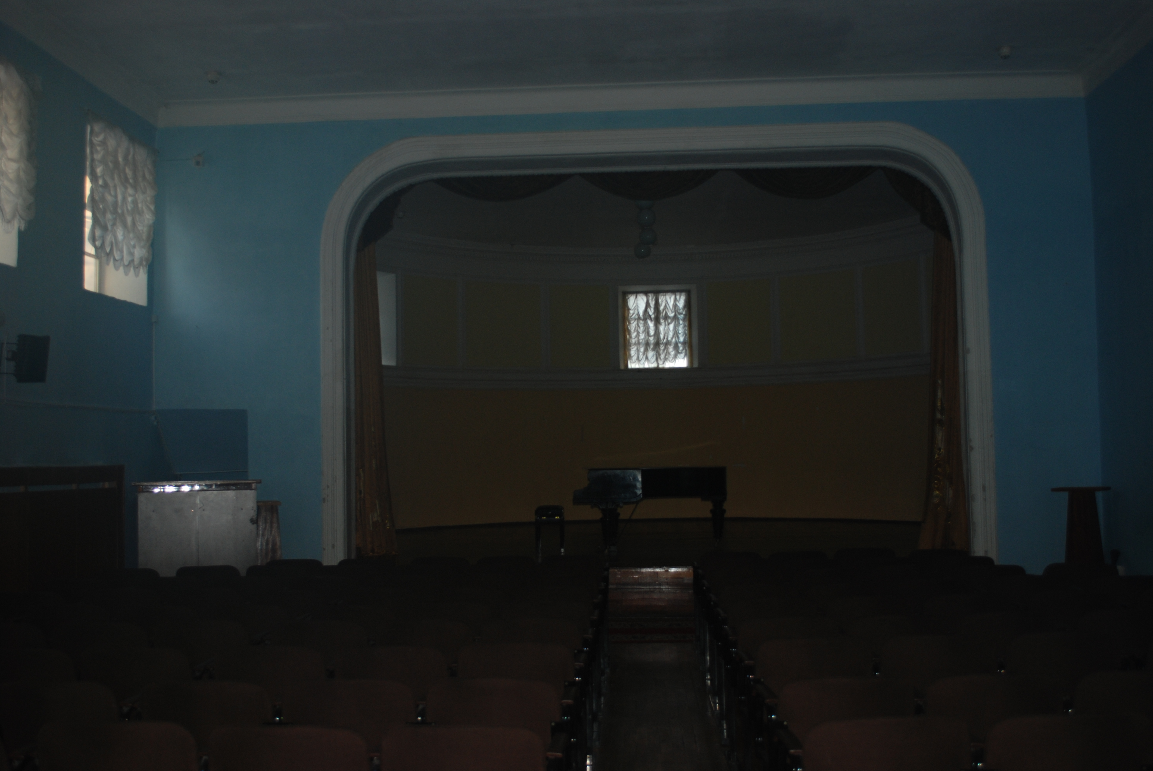 Дом двухэтажный (театр) (Москва и Московская область, Подольск, посёлок Володарского (село Ивановское, Парковая улица, 1))